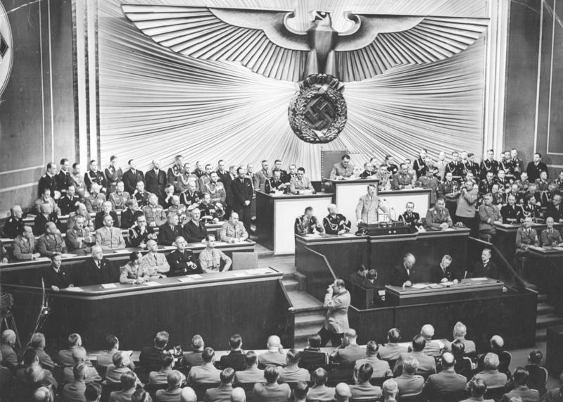 Die erste Sitzung des Großdeutschen Reichstages. Unser Bild zeigt den Führer bei seiner großen Rede. Rechts von Adolf Hitler Staatssekretär Dr. [Otto] Dietrich, links Reichsminister Dr. [Hans Heinrich] Lammers, am Präsidentenplatz Hermann Göring. Scherl-Bilderdienst, Berlin 30.1.1939